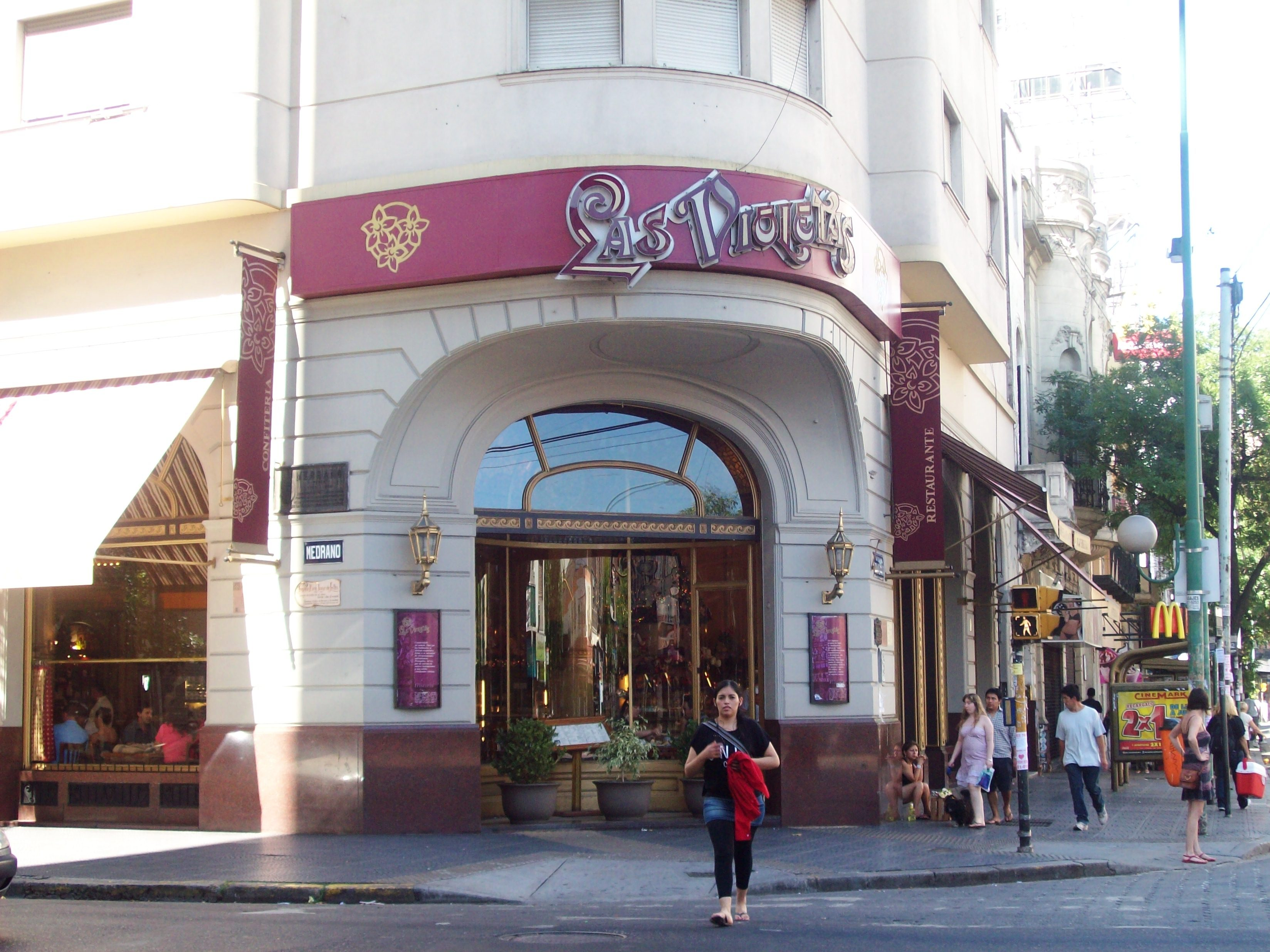 Plano general del café Las Violetas, entre Medrano y Avenida Rivadavia.